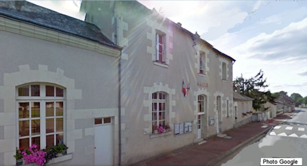 Mairie de Oisly 41